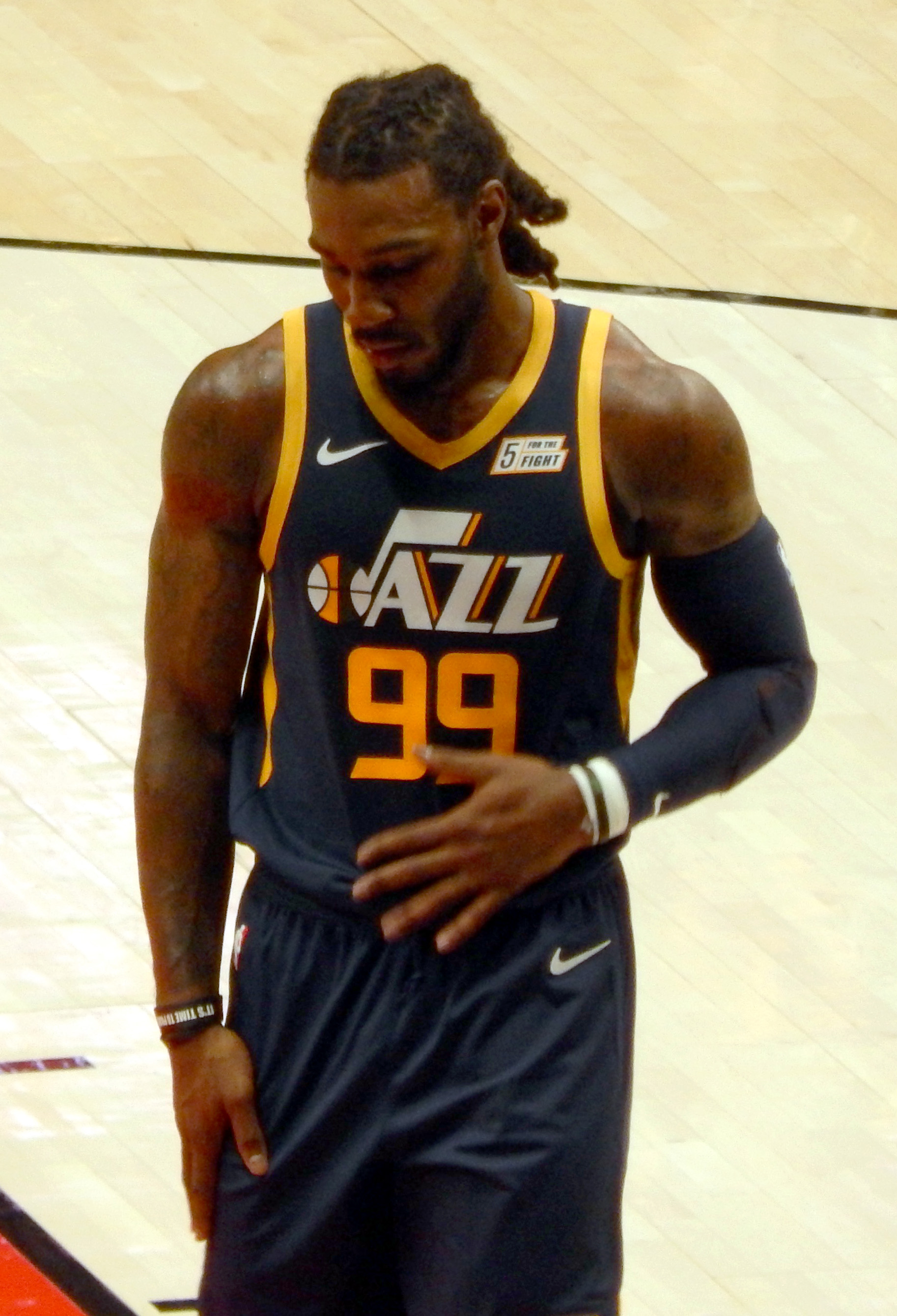 Jae Crowder #99 of the Utah Jazz against the Portland Trail Blazers on October 7, 2018 at Moda Center in Portland, Oregon.